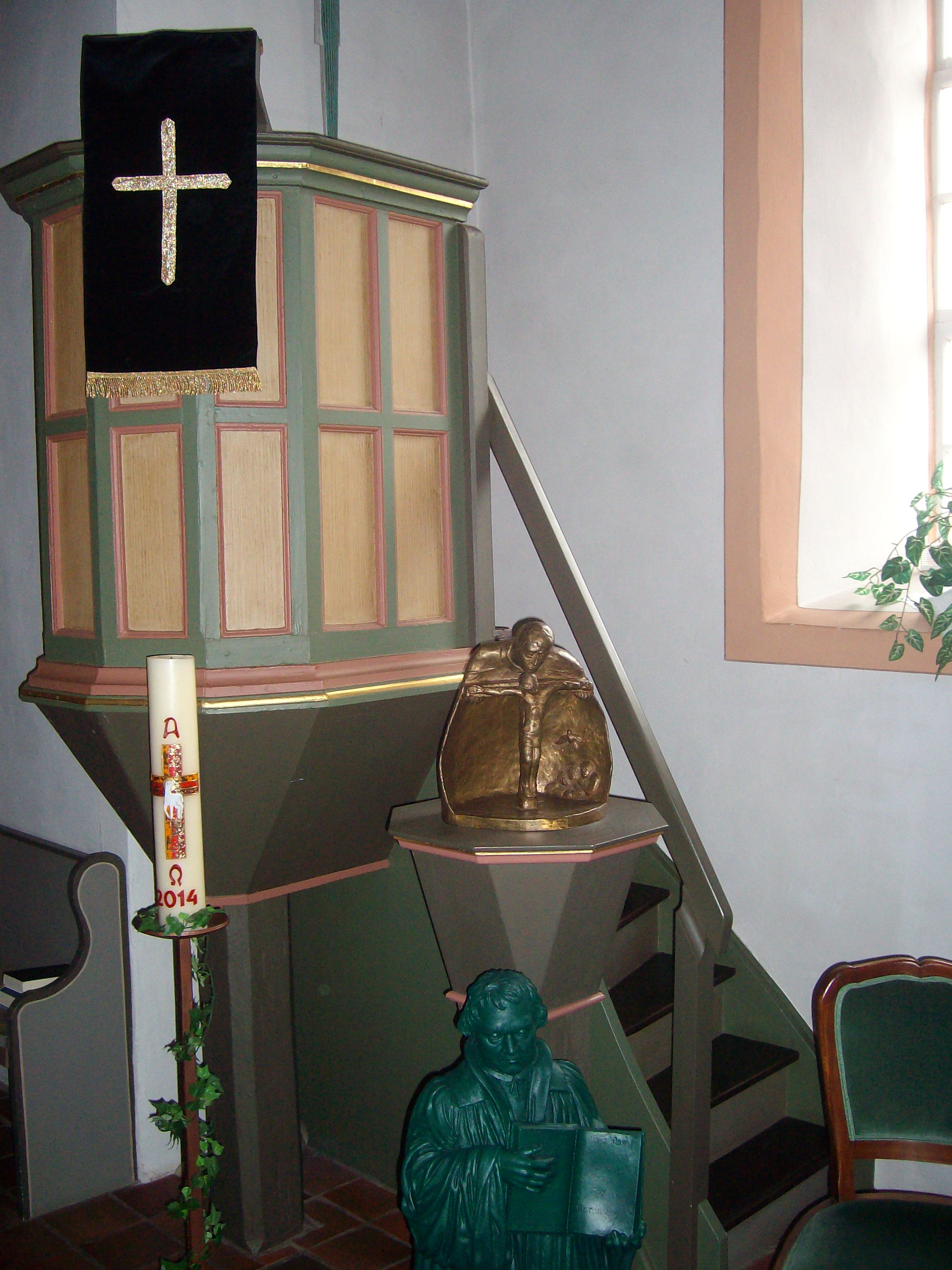 Evangelische Kirche Harbach, Grünberg, Landkreis Gießen, Hessen, Deutschland